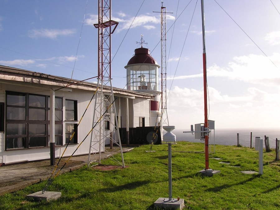 Faro Isla Guafo